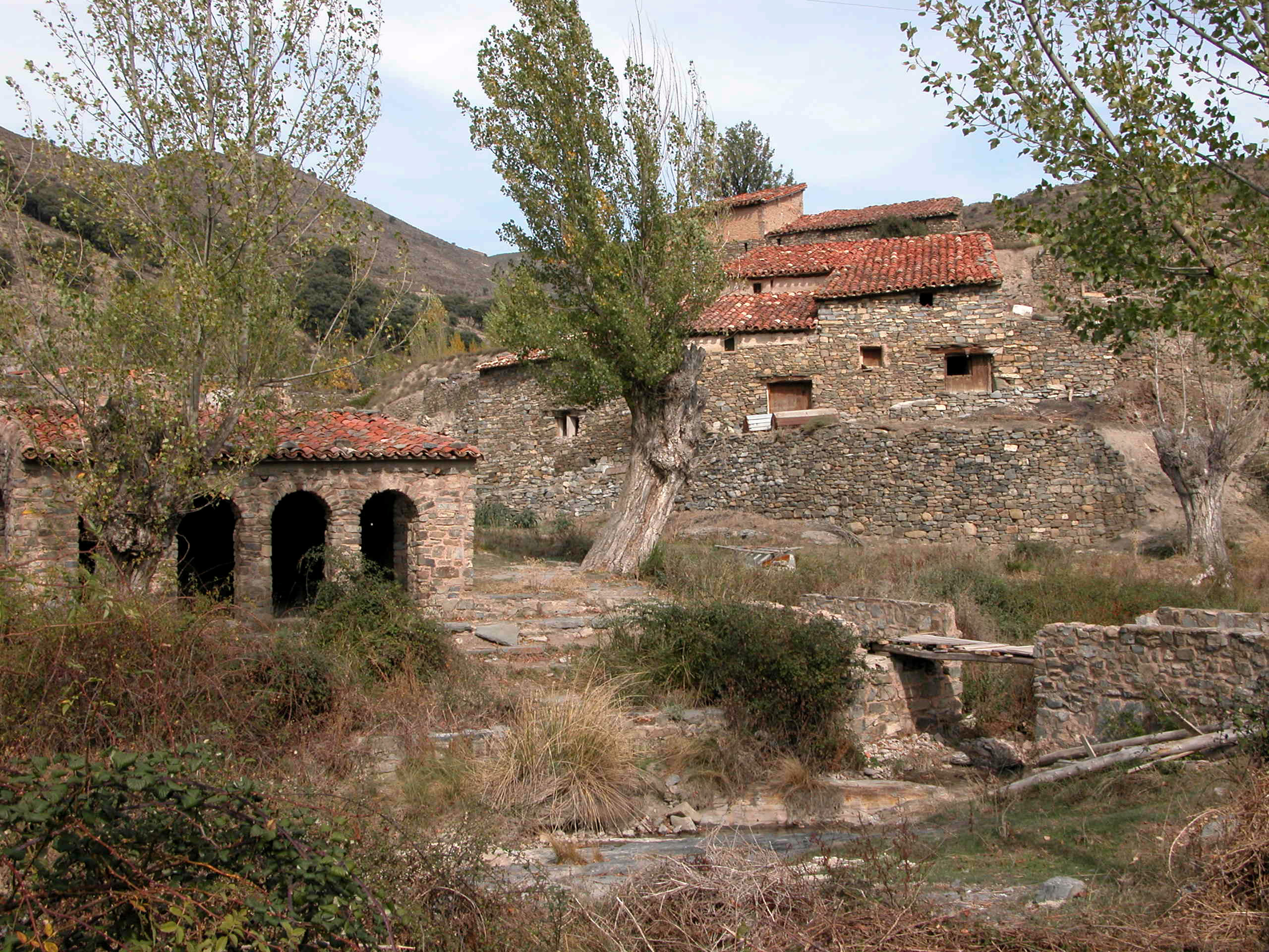 El Villar, aldea de Enciso en La Rioja - España.